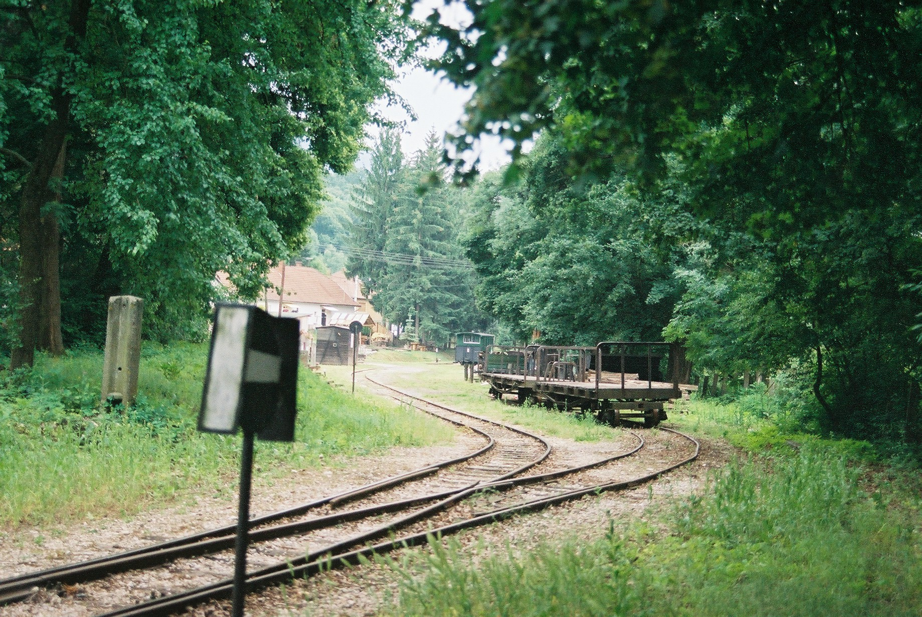 Waldbahn Felsötarkany, Betriebsgelände